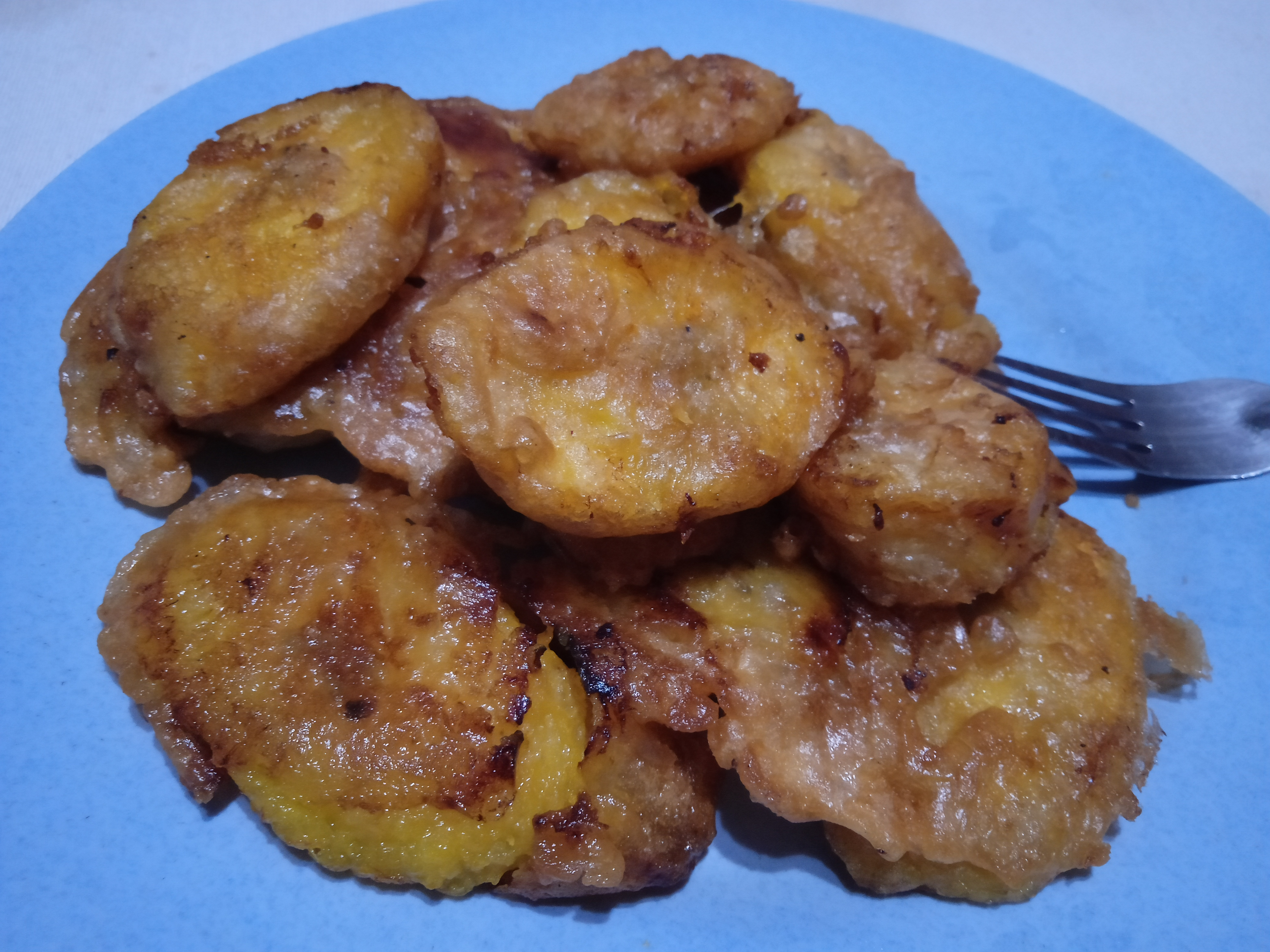 Pisang yang dimasak dengan cara digoreng dengan tepung